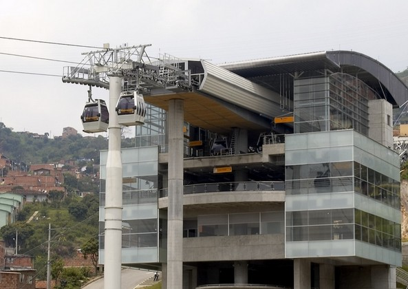 Estación Juan XXIII Metro de Medellín